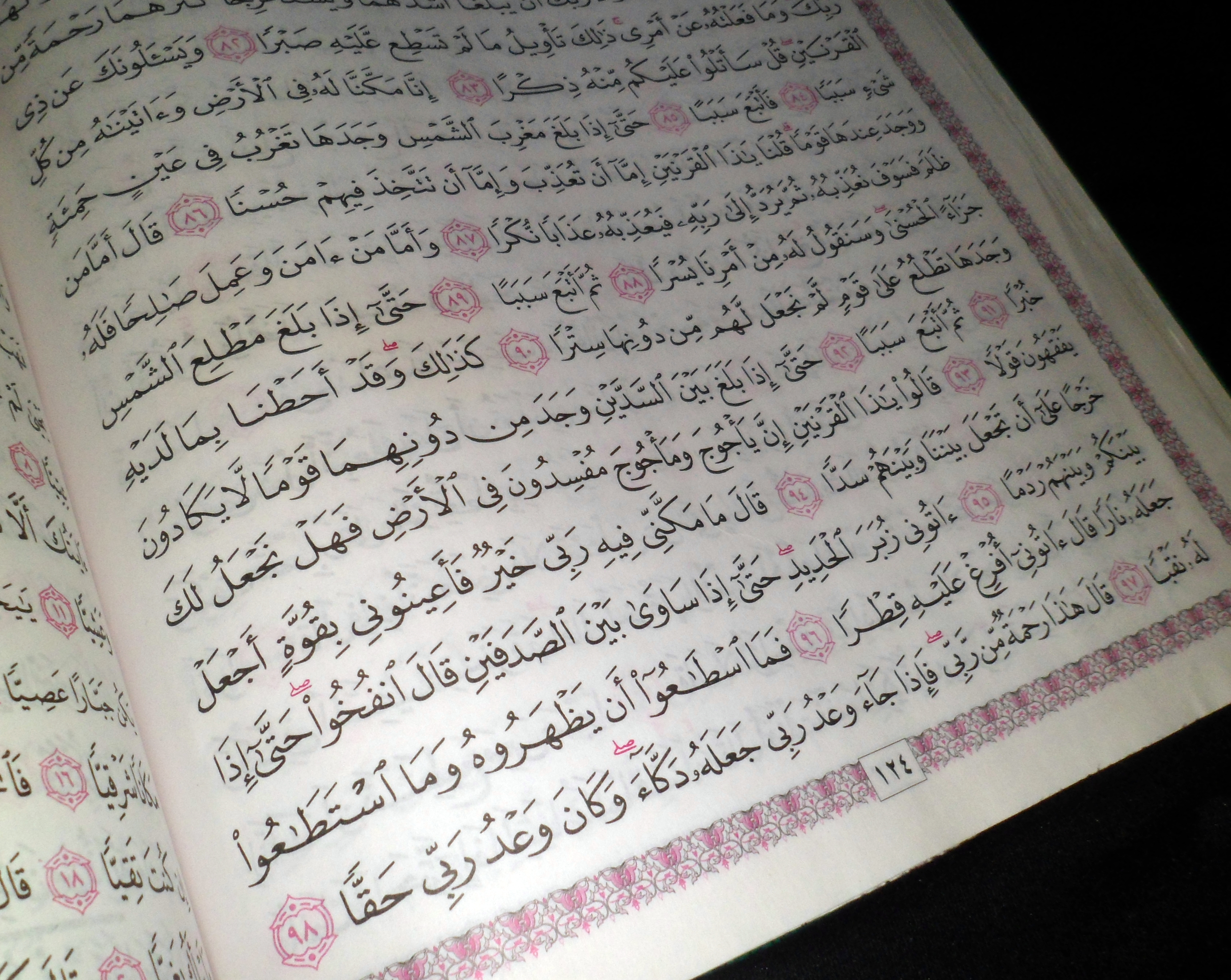 سورة الكهف، من الآية 83 حتى الآية 98. الصورة من مصحف التهجد.